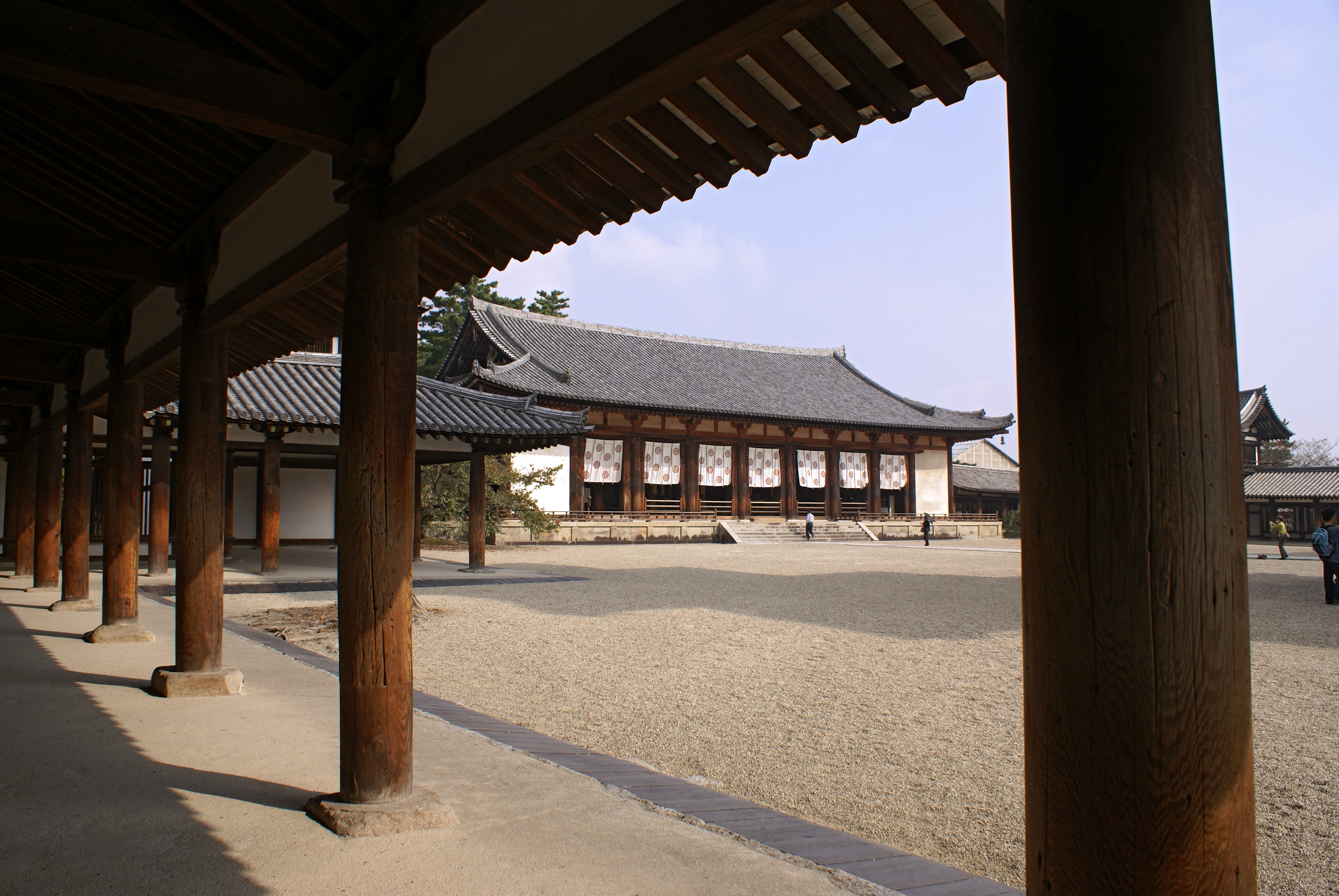 Horyu-ji in Ikaruga, Nara, Japan